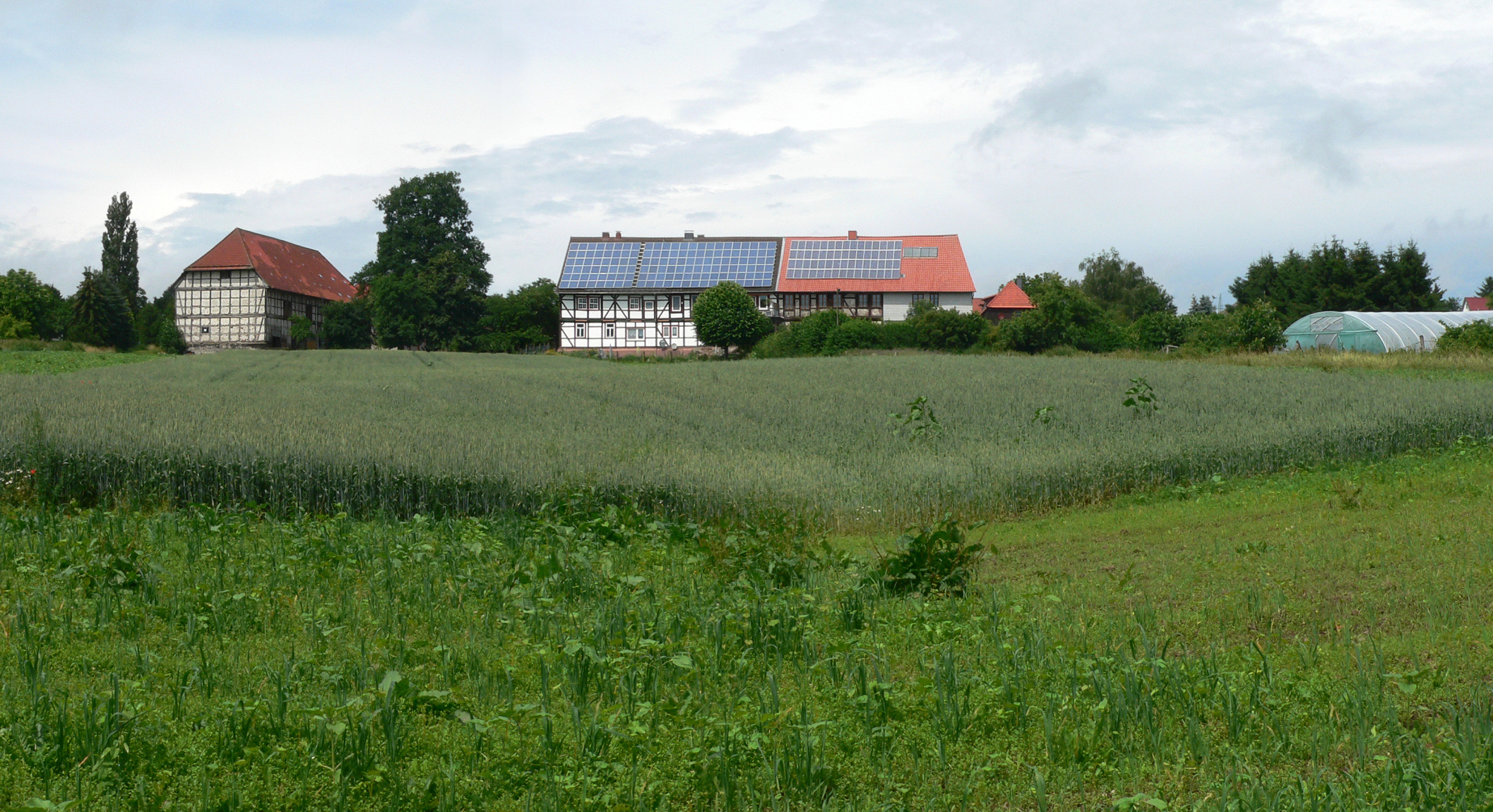 Ausgrabungsstelle in Düna am Harz